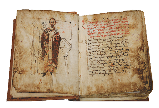 იოანე ოქროპირის ცხოვრება H-2124